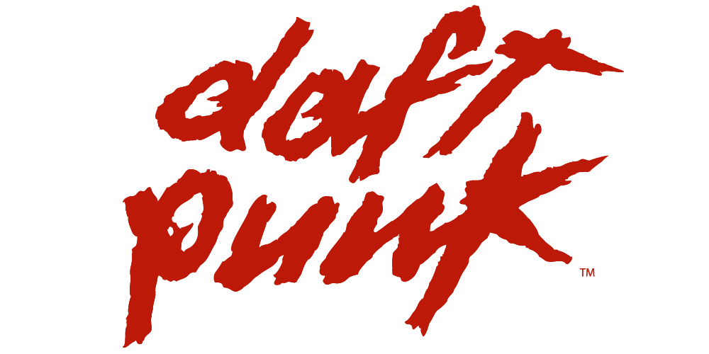 Logo del duo di musica elettronica Daft Punk